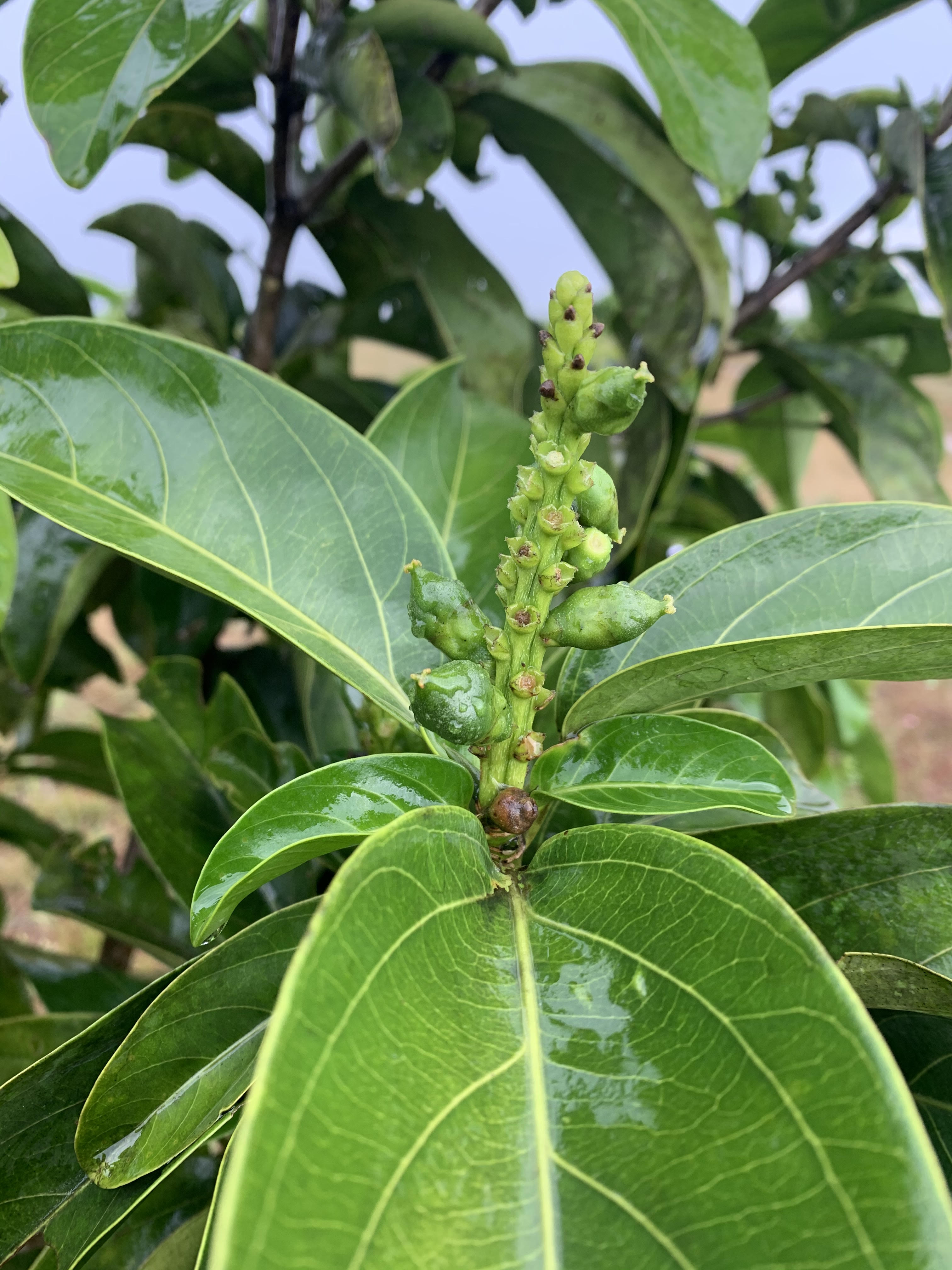 C. orinocense flor femenina